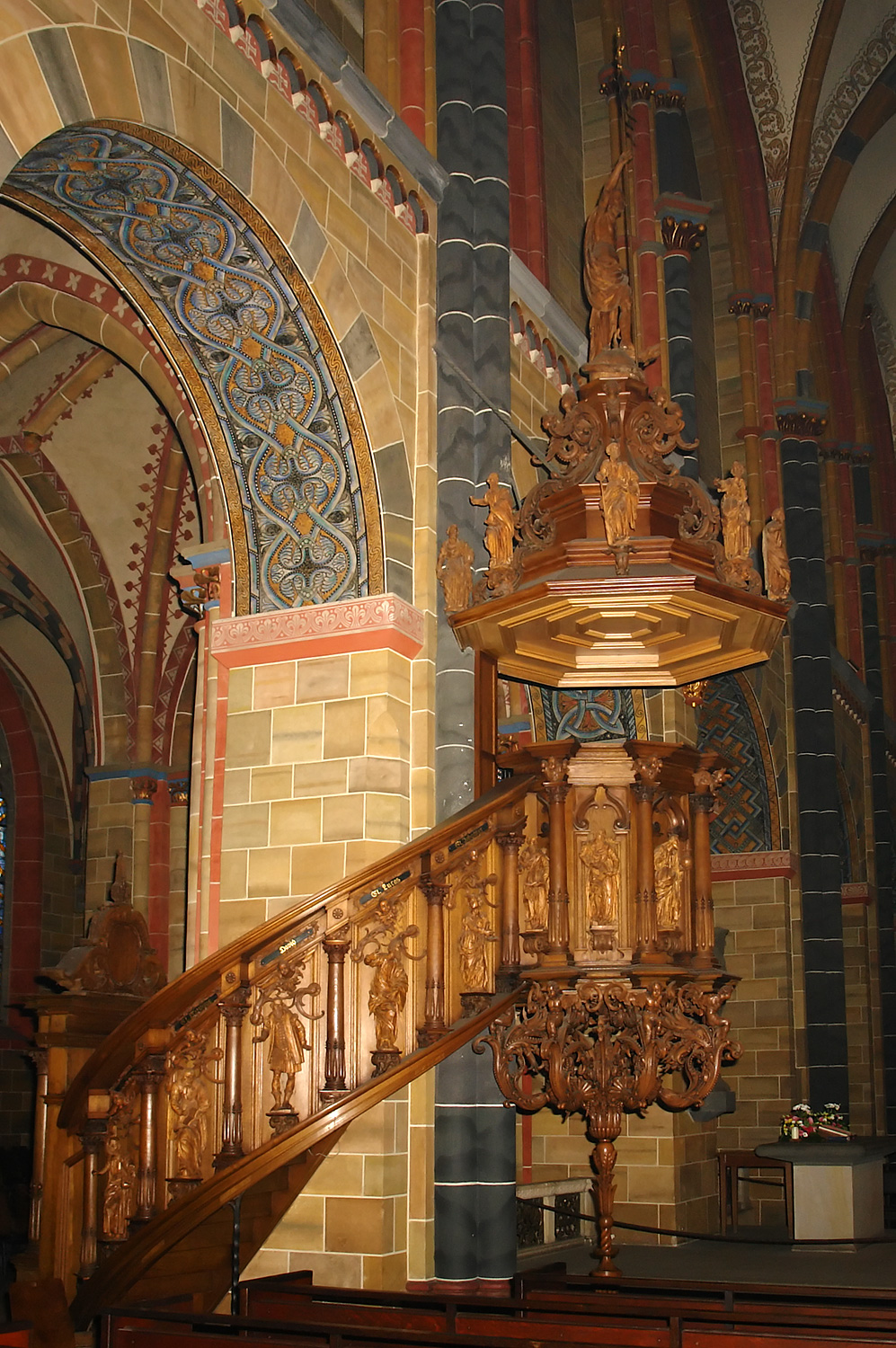 Bremer St. Petri Dom: Die barocke Kanzel (um 1640) ist ein Werk des dänischen Hofbildhauers Jürgen Kriebel. Der Kanzelkorb ist geschmückt mit fast vollplastischen Figuren der Propheten des Alten Testaments und den biblischen Urvätern Abraham, Moses und Salomo. Den Treppenaufgang schmücken König David und die Evangelisten. Den reich verzierten Schalldeckel krönt die Figur des auferstandenen Christus mit der Siegesfahne. Zu seinen Füßen befinden sich allegorische Gestalten der christlichen Tugenden. (Qu.